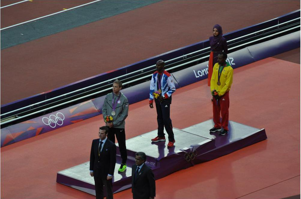 Mens 10k medal ceremony